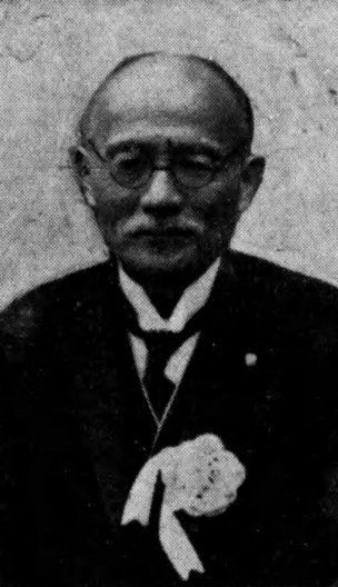 小西重直（1875-1948）